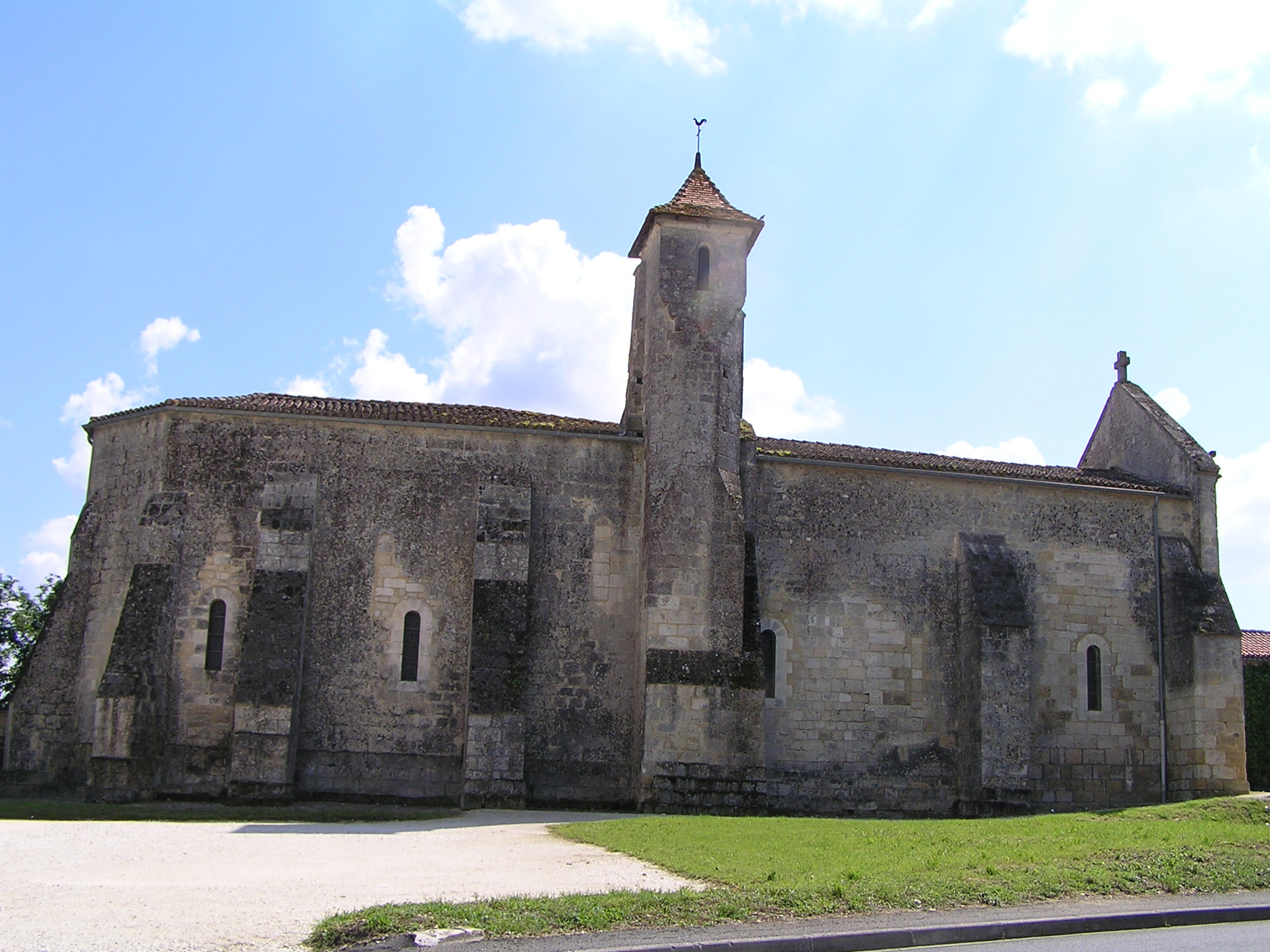 église de Linars, Charente, France